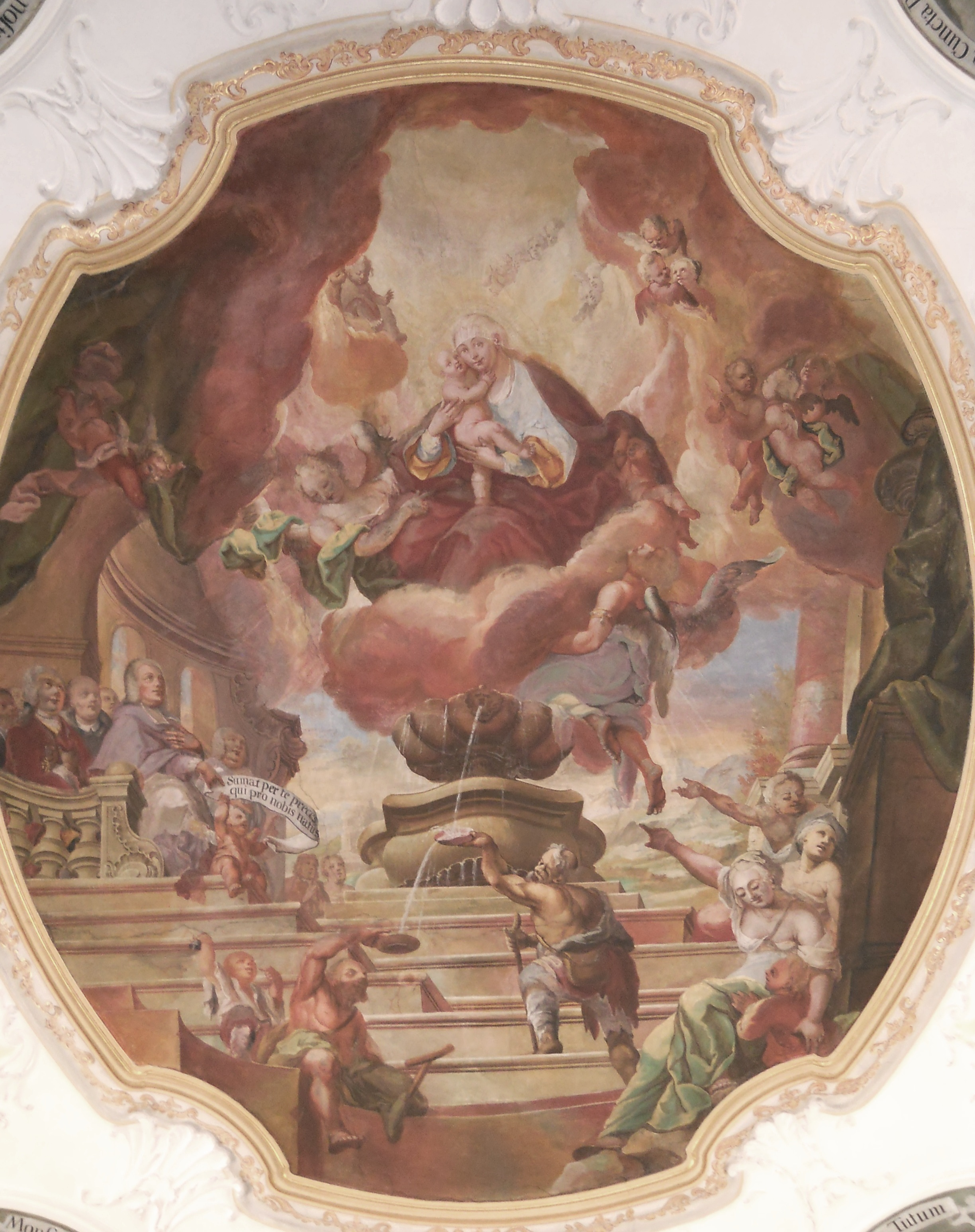 Mariahilf-Kapelle in Eichstätt/Oberbayern, barockes Deckenfresko vom Eichstätter Hofmaler Johann Michael Franz